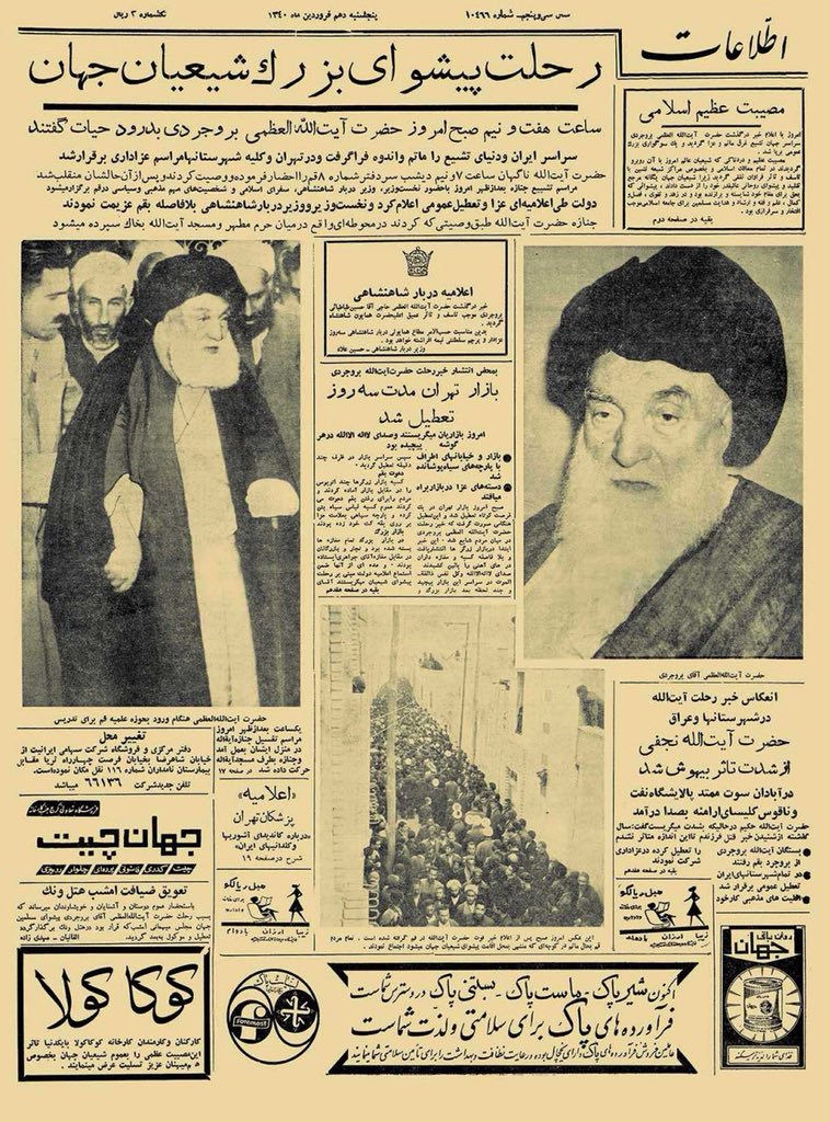 صفحه اول روزنامه اطلاعات، پنجشنبه دهم فروردین 1340 شمسی، شماره 10466